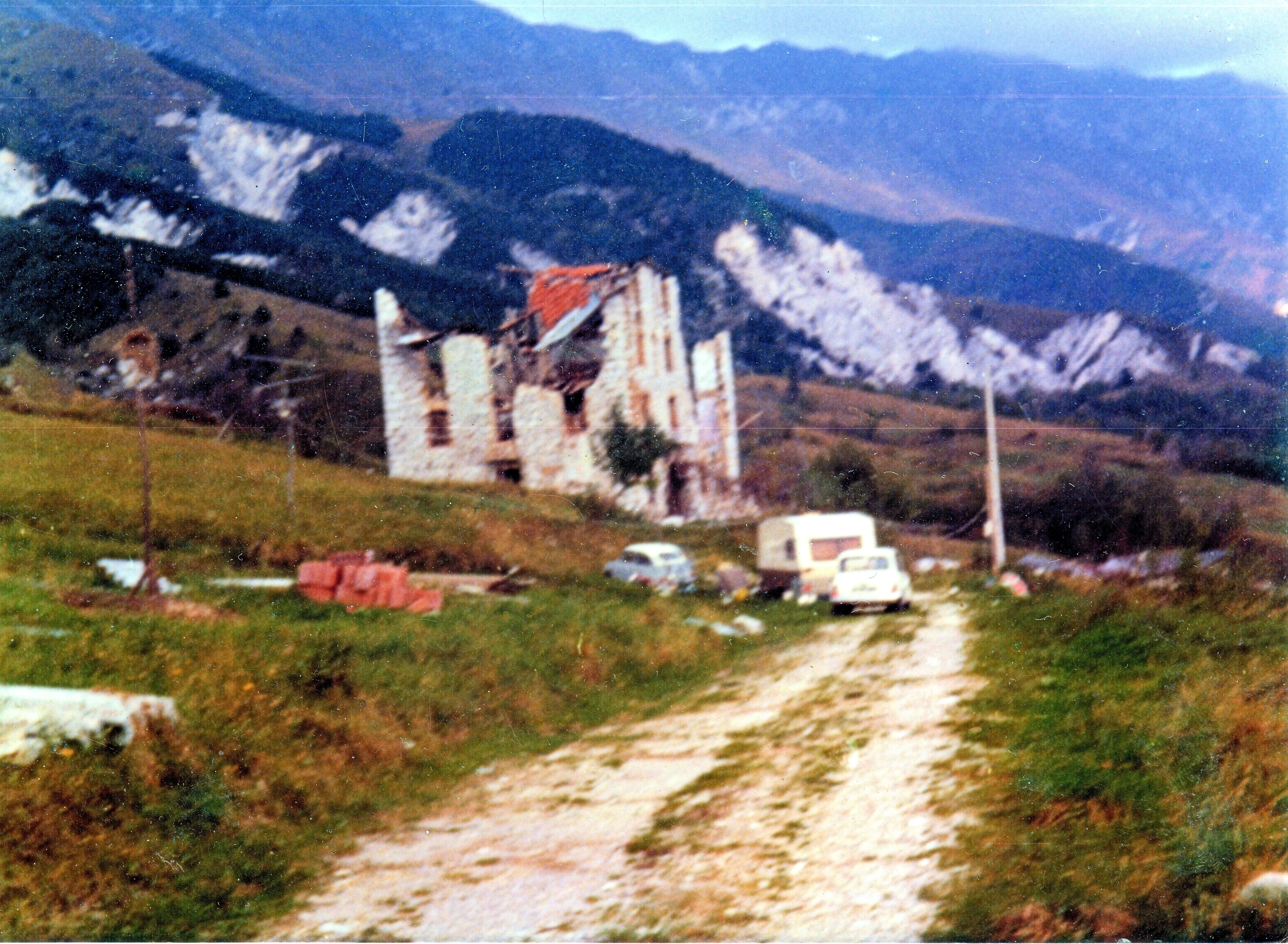 Monteaperta, vue du Borgo Cobai après le séisme de 1976